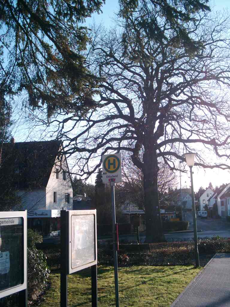 Ehlscheid Kaisereiche